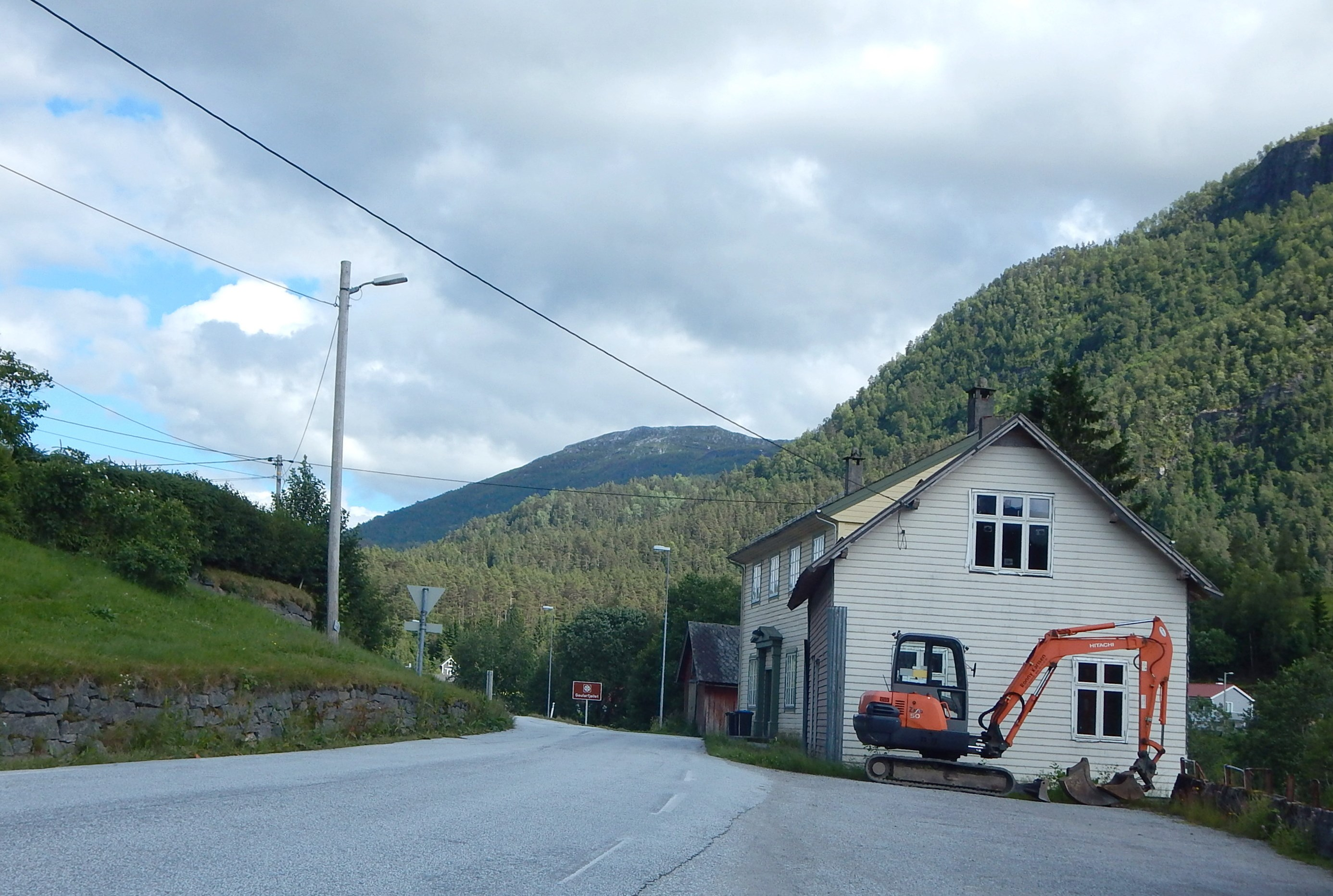 Ved Sande i Gaular går fylkesvei 610 østover som Viksdalsvegen på nordsiden av elven Gaula.